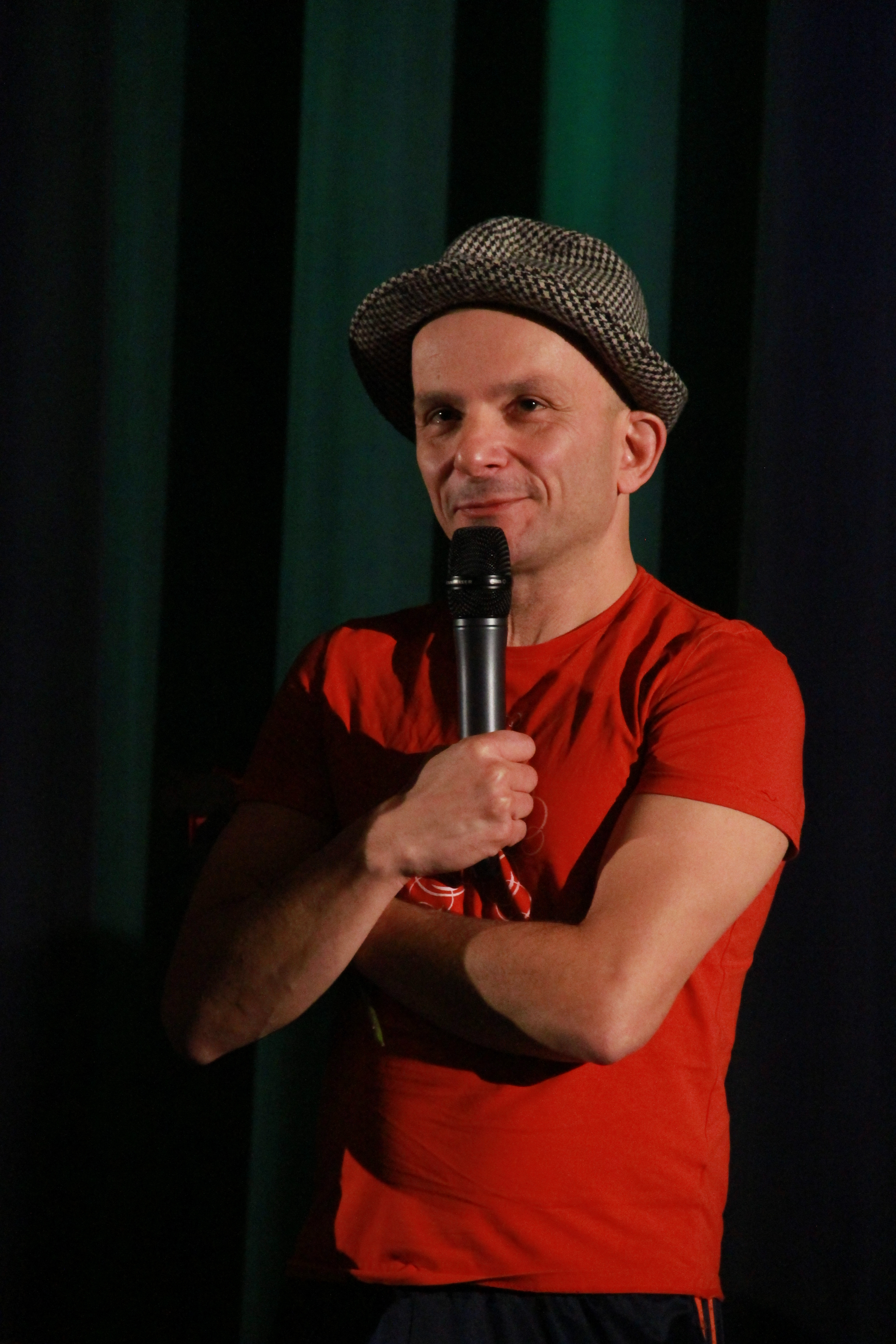 Karim Patwa auf dem Max Ophüls Filmfestival 2015